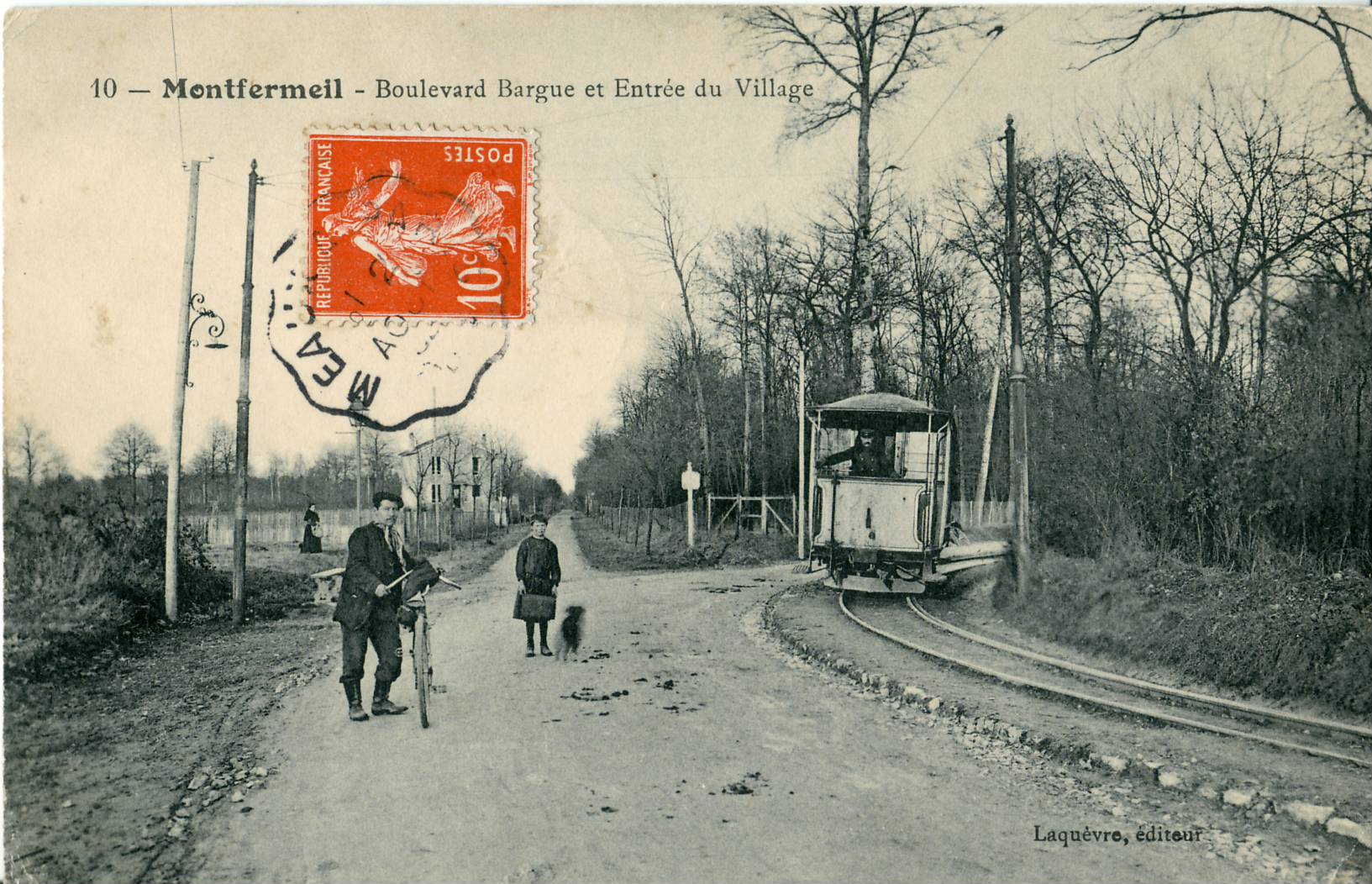 Carte postale ancienne éditée par Laquèvre N°10MONTFERMEIL : Boulevard Bargue et Entrée du VillageVue du Tramway Le Raincy - Montfermeil (exploité jusqu'au 14 avril 1938)